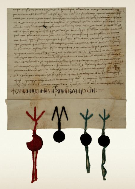 ЖАЛОВАННАЯ, МЕНОВАЯ И ОТВОДНАЯ ГРАМОТА ВЕЛИКОГО КНЯЗЯ МОСКОВСКОГО ИВАНА III ВАСИЛЬЕВИЧА ЕГО ПЛЕМЯННИКАМ КНЯЗЬЯМ ВОЛОЦКИМ ФЕДОРУ И ИВАНУ БОРИСОВИЧАМ Июль 1497 Москва. Подлинник. Писец – Федор Курицын, великокняжеский дьяк 3 л. Бумага; чернила 41 х 30,2; 40,8 х 30,2; 31 х 30,2 На л. 1 об. почерком конца XV – начала XVI века: «Княж Борисовых детей волоцкого, 7005-го году». Под текстом имеется подпись митрополита московского Симона Происходит из московского великокняжеского архива Реставрирована в 1996 году в лаборатории микро-фотокопирования и реставрации документов РГАДА инв. ф. 135, отд. I, рубрика II, инв. 78